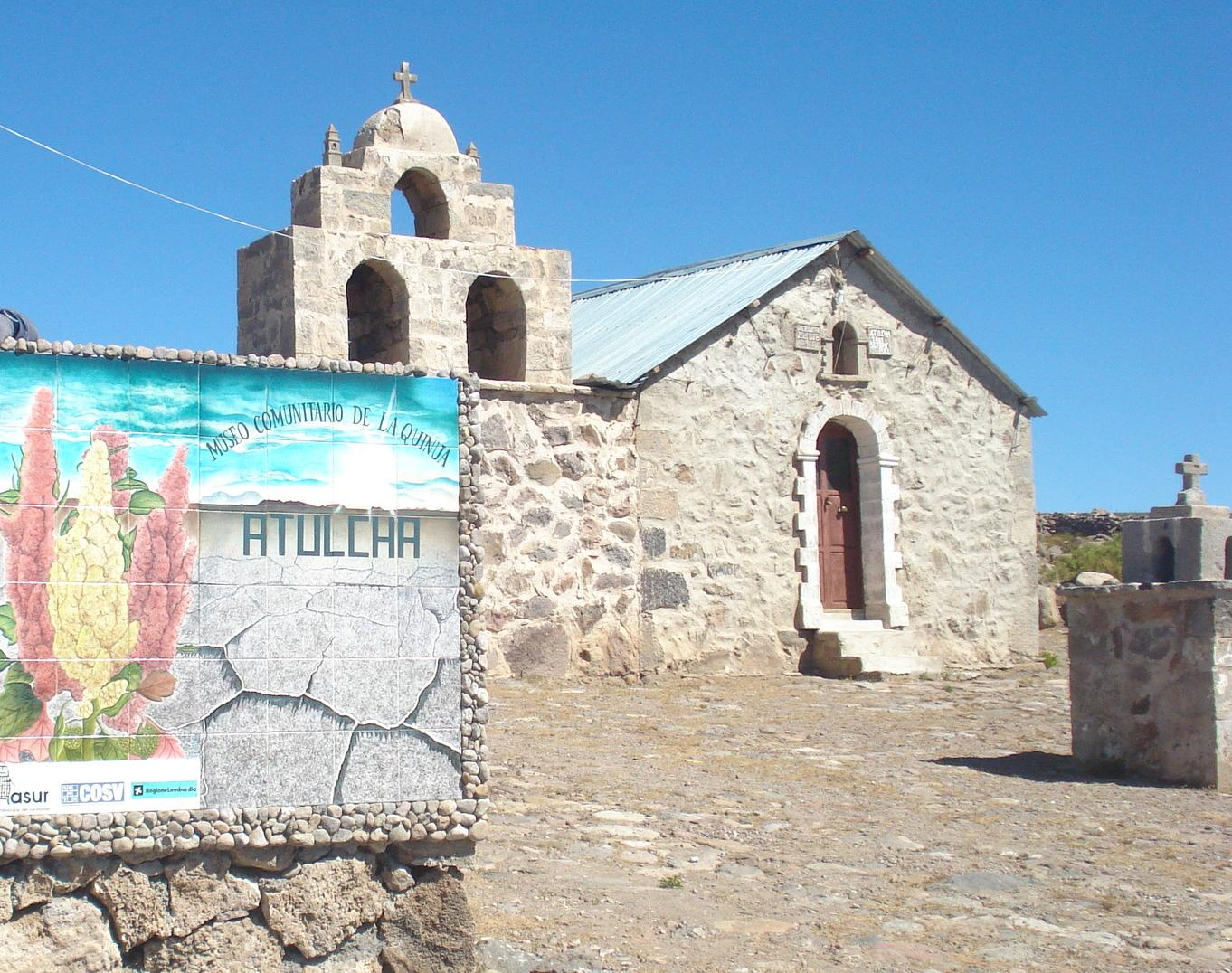 Atulcha, localidad del Municipio de Colcha K, Provincia de Nor Lípez, Departamento de Potosi, Bolivia.